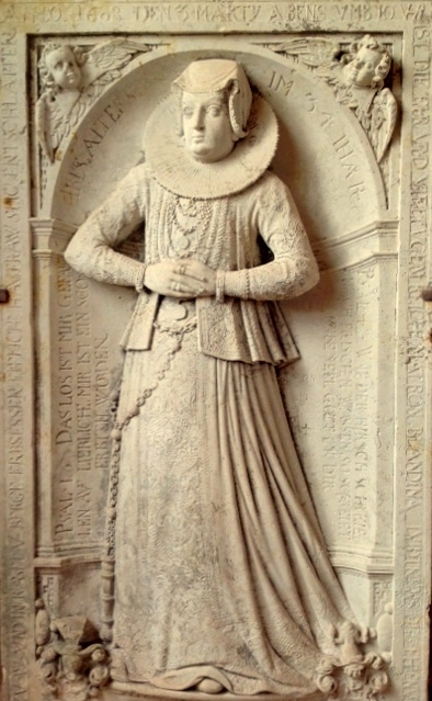 Grabplatte der Blandina Goldbeck geb. Luidtkens in der Johanniskirche in Werben erstellt nach 1608